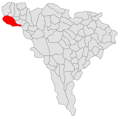 Categorie:Hărţi ale judeţului Alba